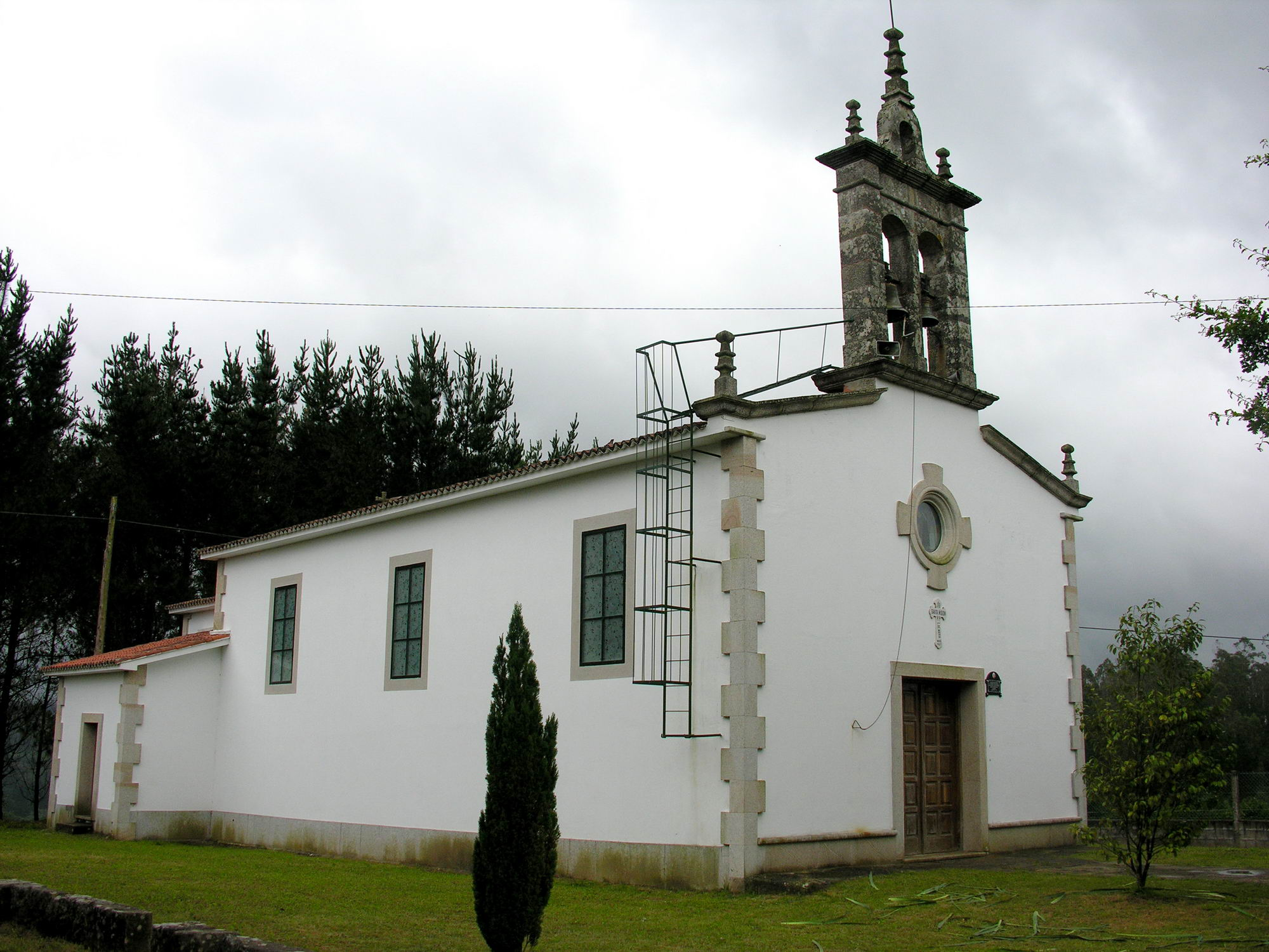 Igrexa de Vilarromarís, Oroso, Galiza